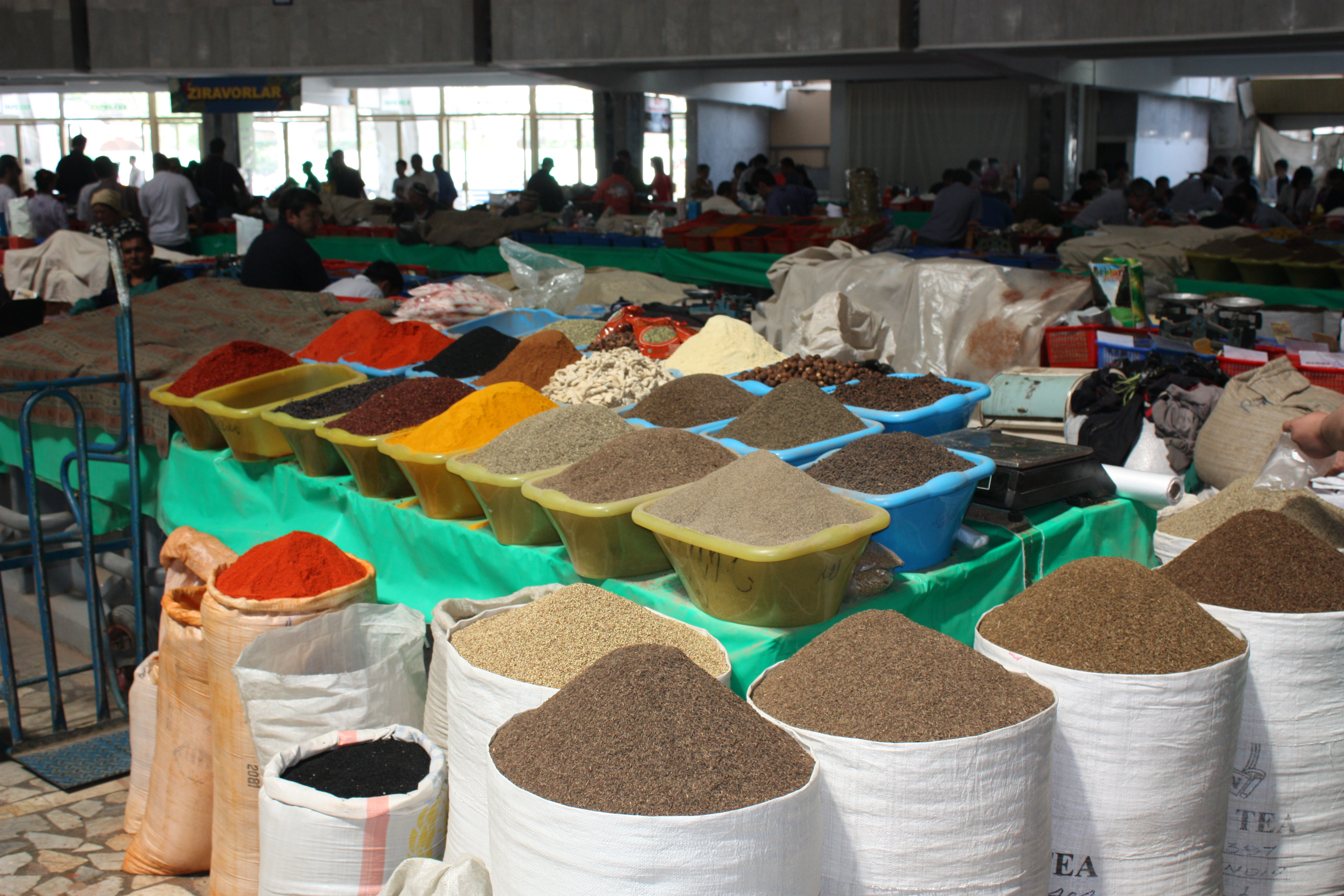 Tashkent, Chorsu Bazaar